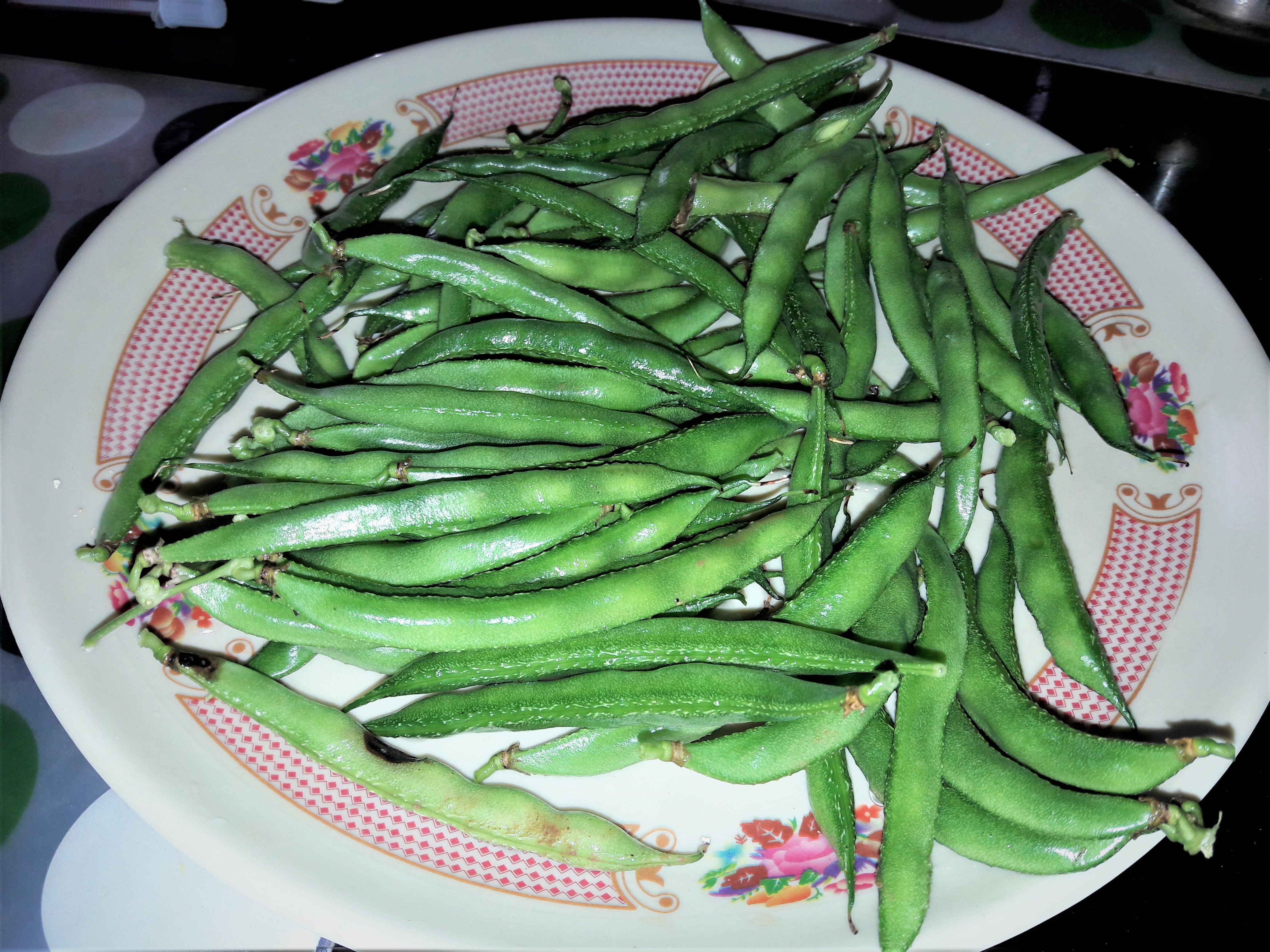 చిక్కుడు కాయలు